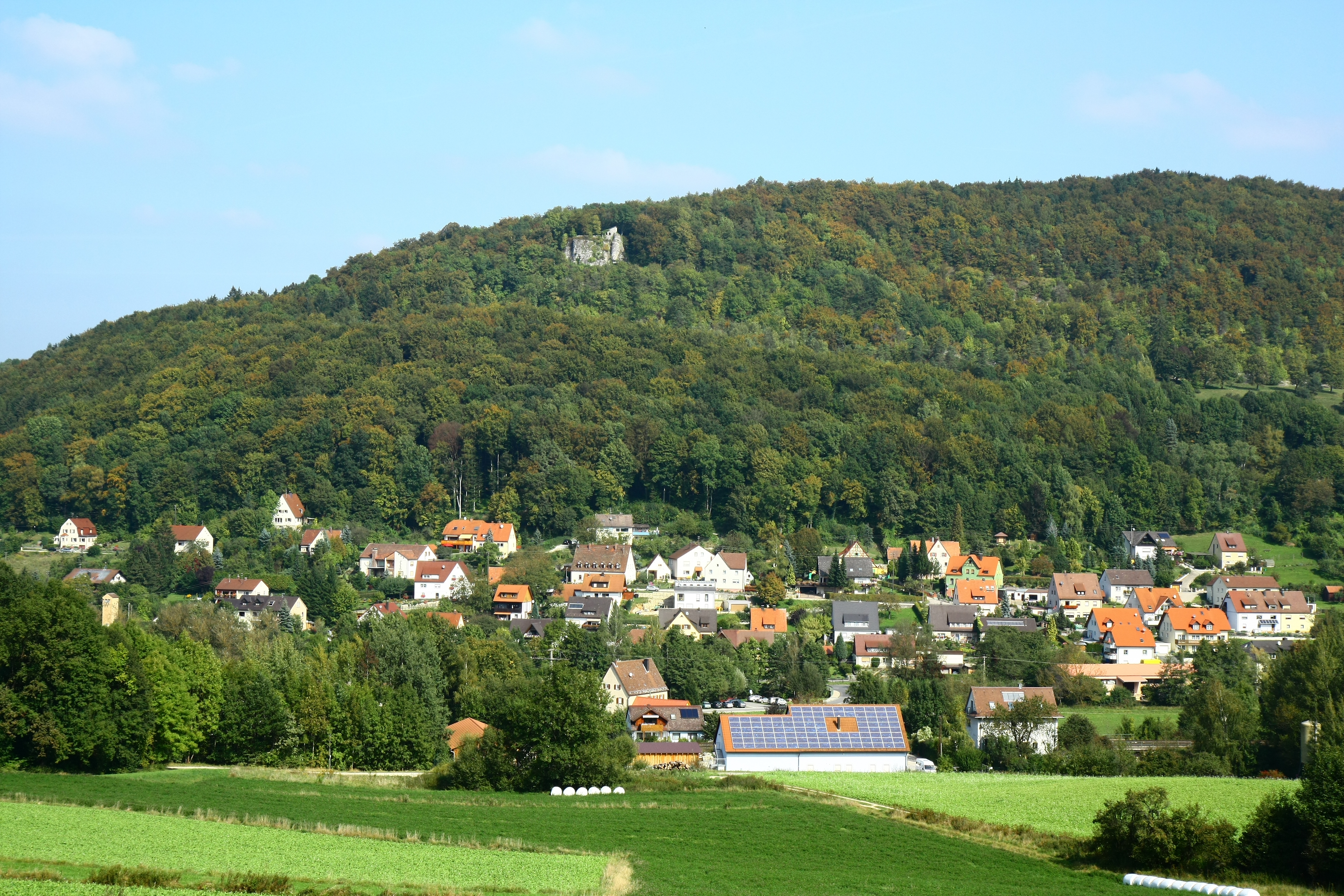 Ansicht der Burgruine Lichtenstein über Pommelsbrunn aus südlicher Richtung